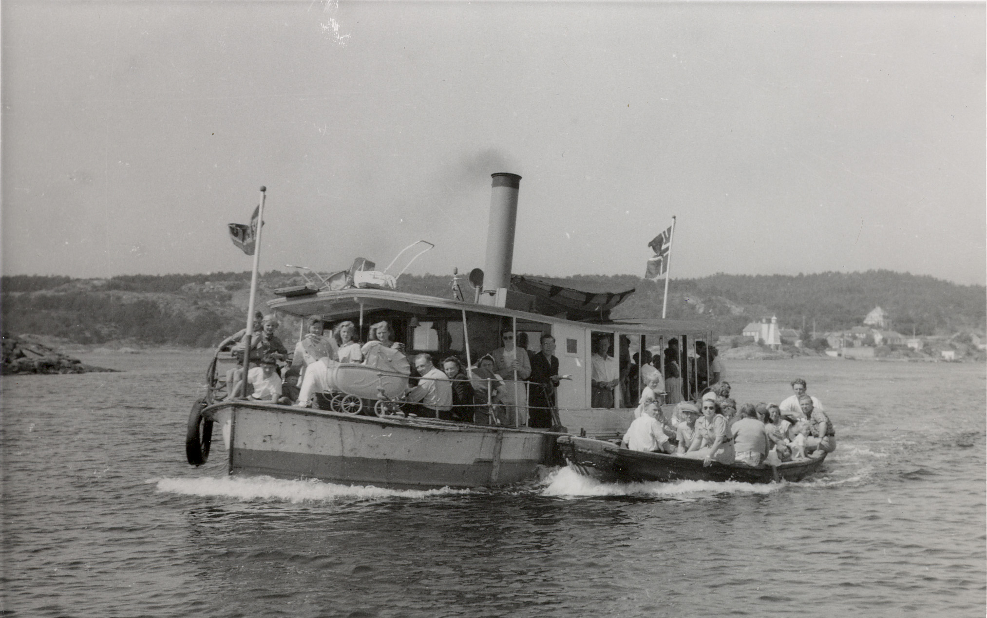 Fotoarkivar Åse Lange viser frem ett av sine favorittbilder fra Riksarkivets samling. Favorittbilde #1: ”Pelle” mellom Arendal og uthavnene. Blant Riksarkivets over en million fotografier er det mange jeg ikke ennå har sett og mange som er glemt, men enkelte bilder har festet seg i hukommelsen. Av sommerbildene er dampskipet ”Pelle” en favoritt. Bildet er tatt ytterst i Galtesund med Sandvikodden fyr og Hisøya i bakgrunnen. ”Pelle” som var i drift til 1961, er på vei fra Arendal til Merdø. For å få med alle passasjerene måtte ”Pelle” av og til benytte en pram som ekstrabåt. Bildet formidler gemyttlig sommerstemning for ca. 60 år siden, og mange sikkerhetskrav er kommet til etter den tid. Landslaget for reiselivet i Norge skulle spre norgesreklame, og bildet er en hyggelig fortelling om sommeridyll på Sørlandet. ”Pelle” var et kjært fartøy i lokalmiljøet – se Om fotografen – se Om arkivet etter Landslaget for reiselivet – se Foto: Birger Dannevig Fra arkivet etter Landslaget for reiselivet i Norge (PA-0722 Uaa6) .